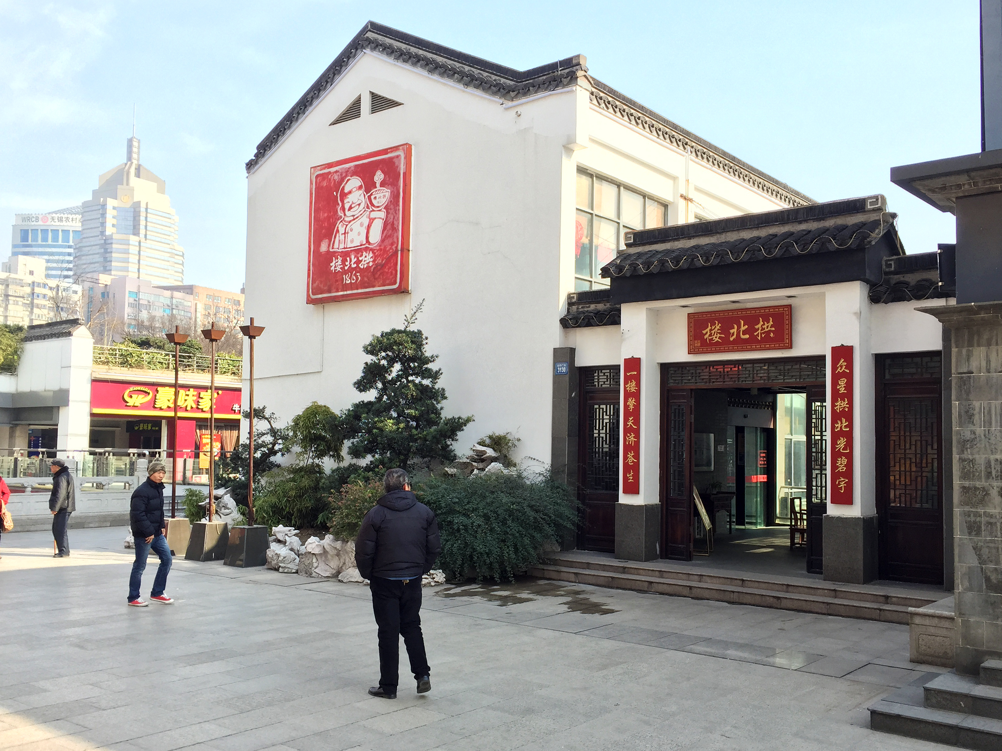 中文（中国大陆）: 無錫拱北樓麵館